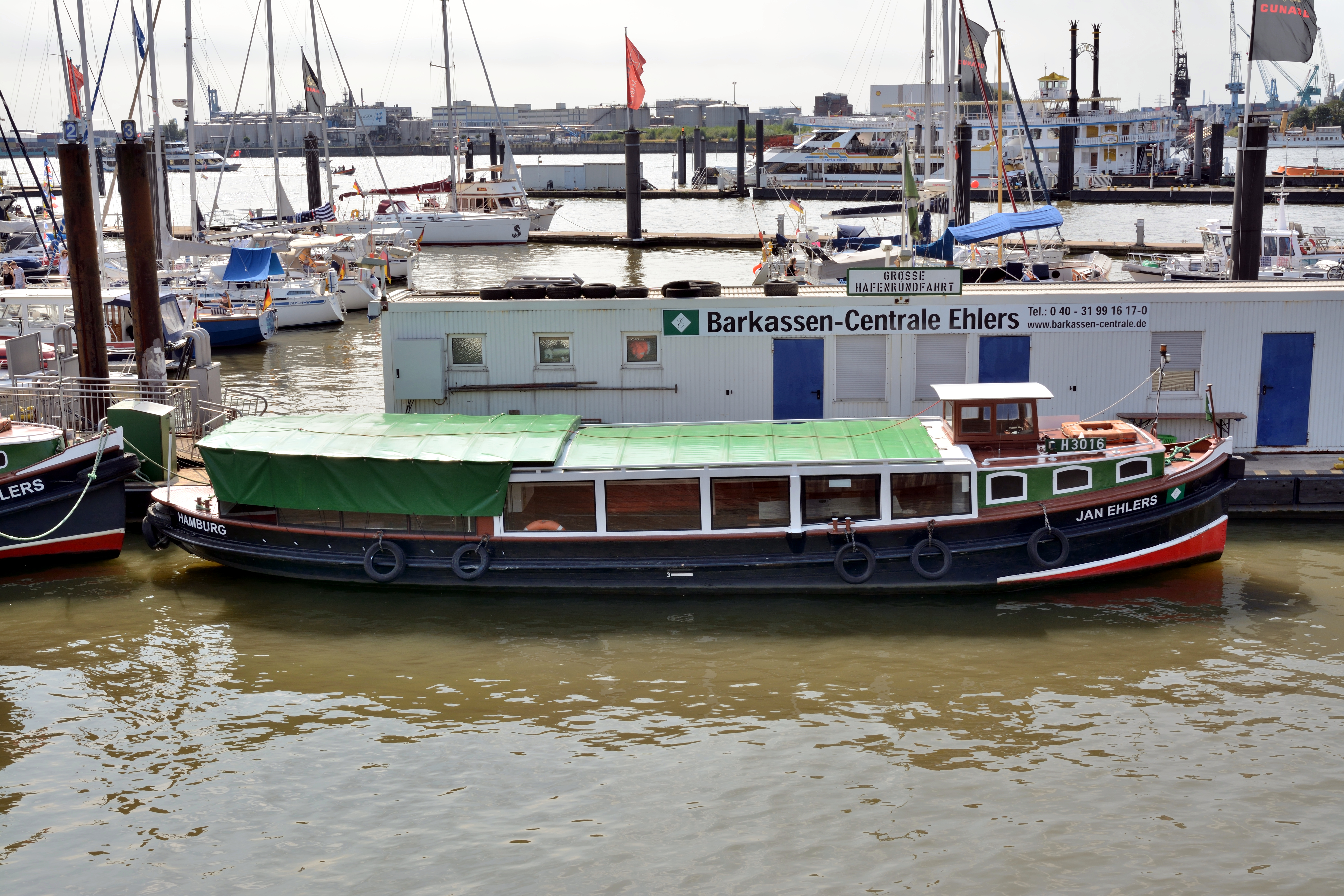 Impressionen einer Barkassenfahrt im August 2016 durch den Hamburger Hafen. Die ehemalige Reichspostbarkasse "Adolf 4"